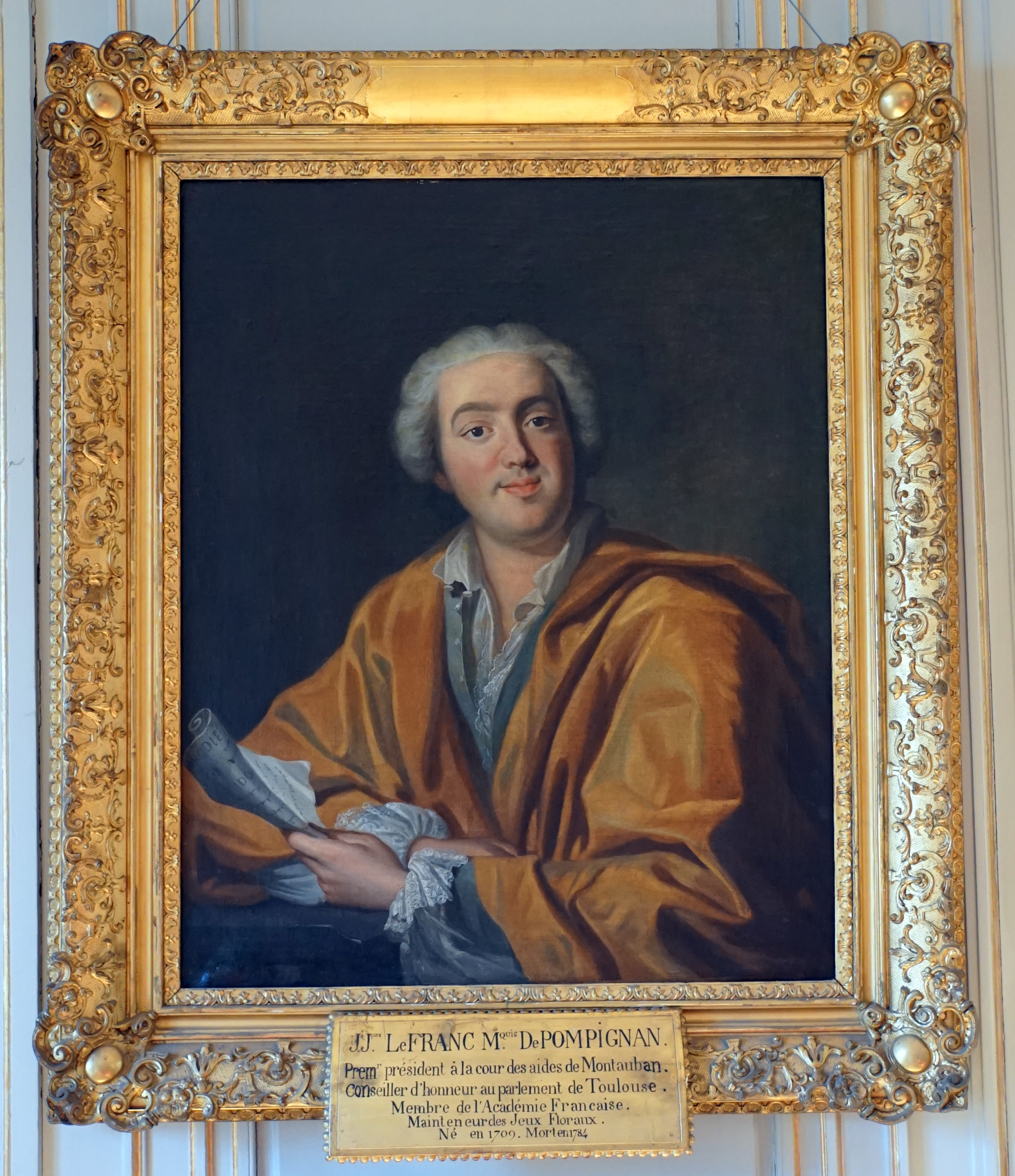 Jean-Jacques Le Franc de Pompignan, Académie des Jeux Floraux, Toulouse